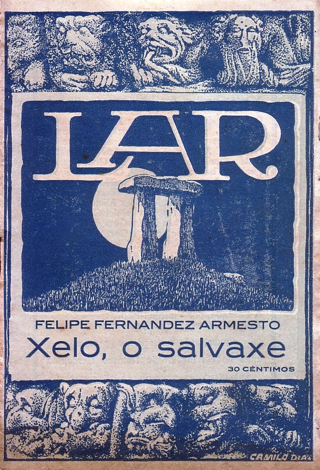 23 Xelo o salvaxe. Felipe Fernández Armesto. Lar. 1926.jpg